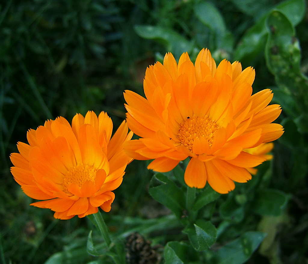 Calendula officinalis